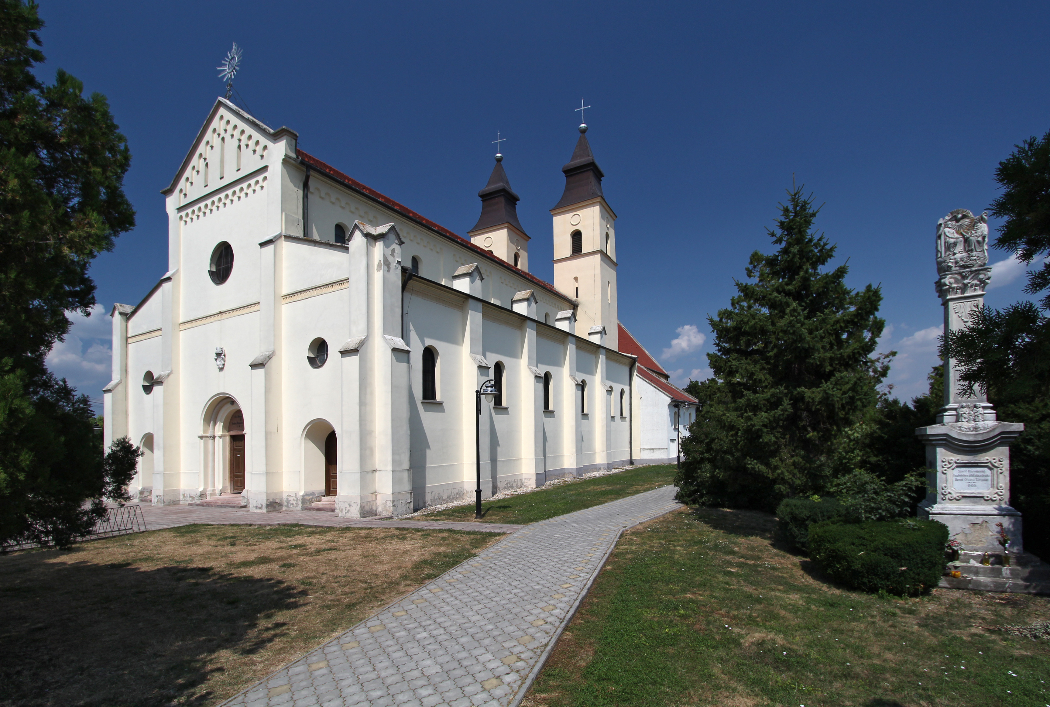 Diakovce, Kostol Nanebovzatia Panny Márie. Pôvodne súčasť benediktínskeho kláštora z 11. storočia, dnes farský kostol. Románska trojloďová bazilika, vysvätená v roku 1228, bola v rokoch 1872-1875 predĺžená neorománskou prístavbou podľa projektu F. Schuleka.